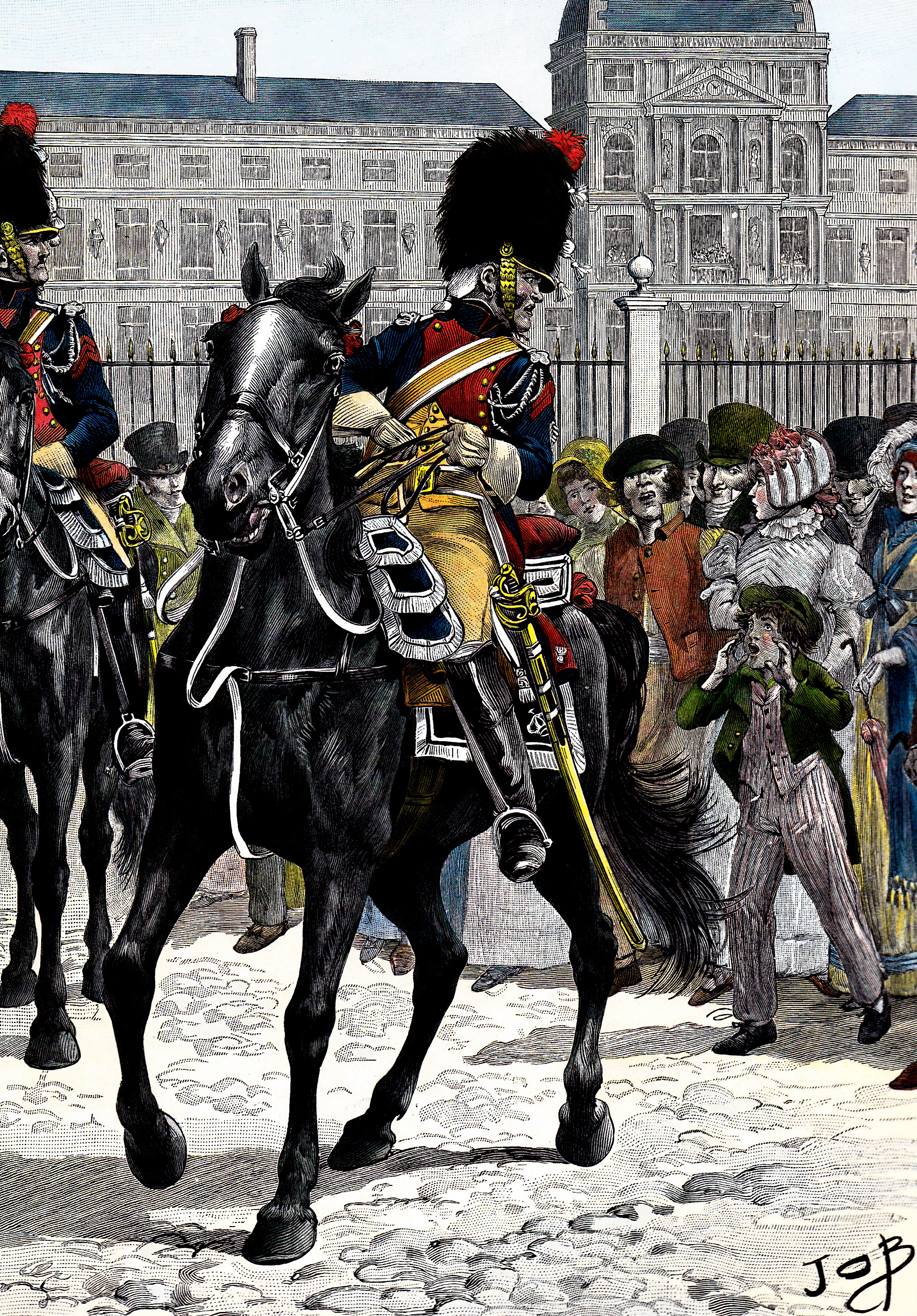 Les gendarmes d'élite devant les grilles des Tuileries, le 20 mars 1811. L'Impératrice attend un enfant. « Je te parie que c'est une fille » lance le gamin au gendarme qui ne semble pas apprécier. Peu après, le canon retentira pour annoncer la naissance de l'Aiglon, le fils de Napoléon.